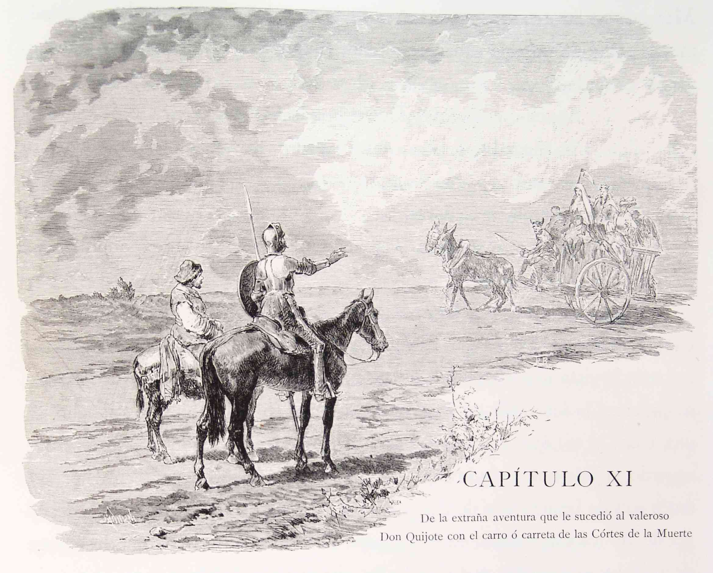 202_155_quijote_cap11